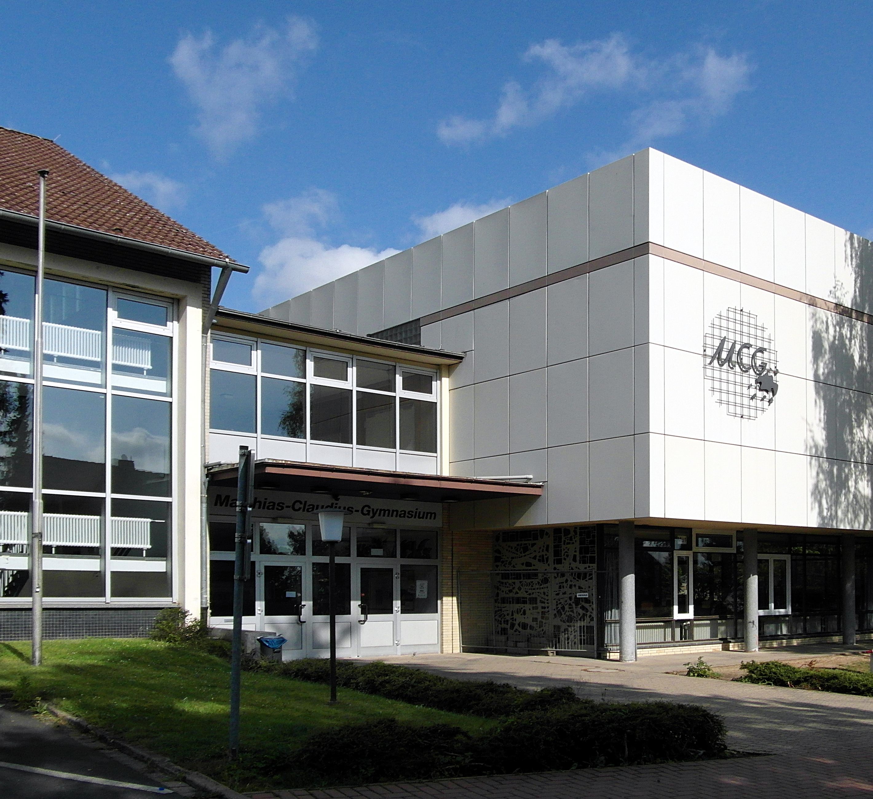 Eingangsbereich und Aula des Matthias-Claudius-Gymnasium in Gehrden